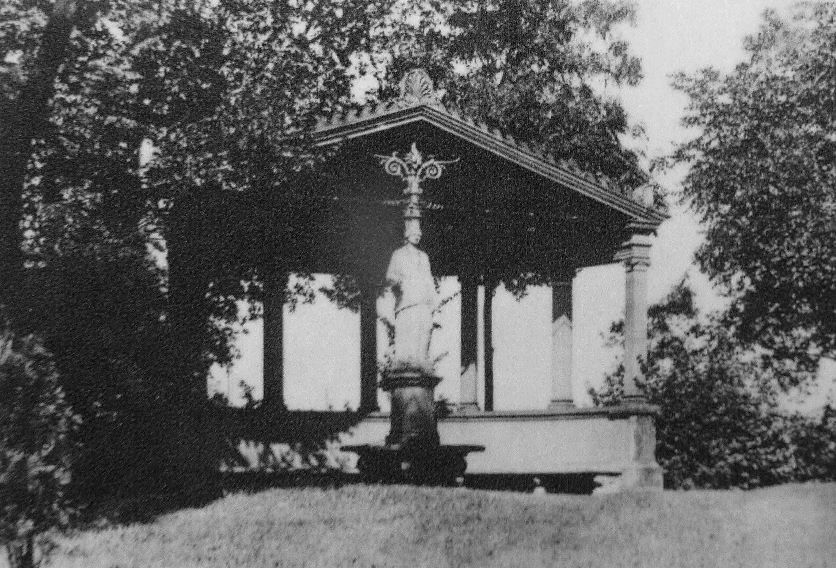 Frankfurt am Main: Der Von-Bernus-Park (im lokalen Sprachgebrauch auch kurz „Bernuspark“ genannt) ist eine Parkanlage im vormals eigenständigen Dorf und heutigen Stadtteil Bockenheim, westlich der Frankfurter Innenstadt. Diese Grünanlage ist in ihrer heutigen Form ein Überrest des Schlossparks des auf das 18. Jahrhundert zurückgehenden und im Zweiten Weltkrieg zerstörten Bockenheimer Schlosses. Das Foto zeigt den kleinen Tempel (nicht erhalten) auf einem Hügel in der westlichen Ecke des Parks; Aufnahme aus dem Jahr 1900. Quelle dieser Reproduktion eines historischen Fotos: Informationstafel des städtischen Grünflächenamtes im Von-Bernus-Park; Urheber des Fotos nicht namentlich bekannt